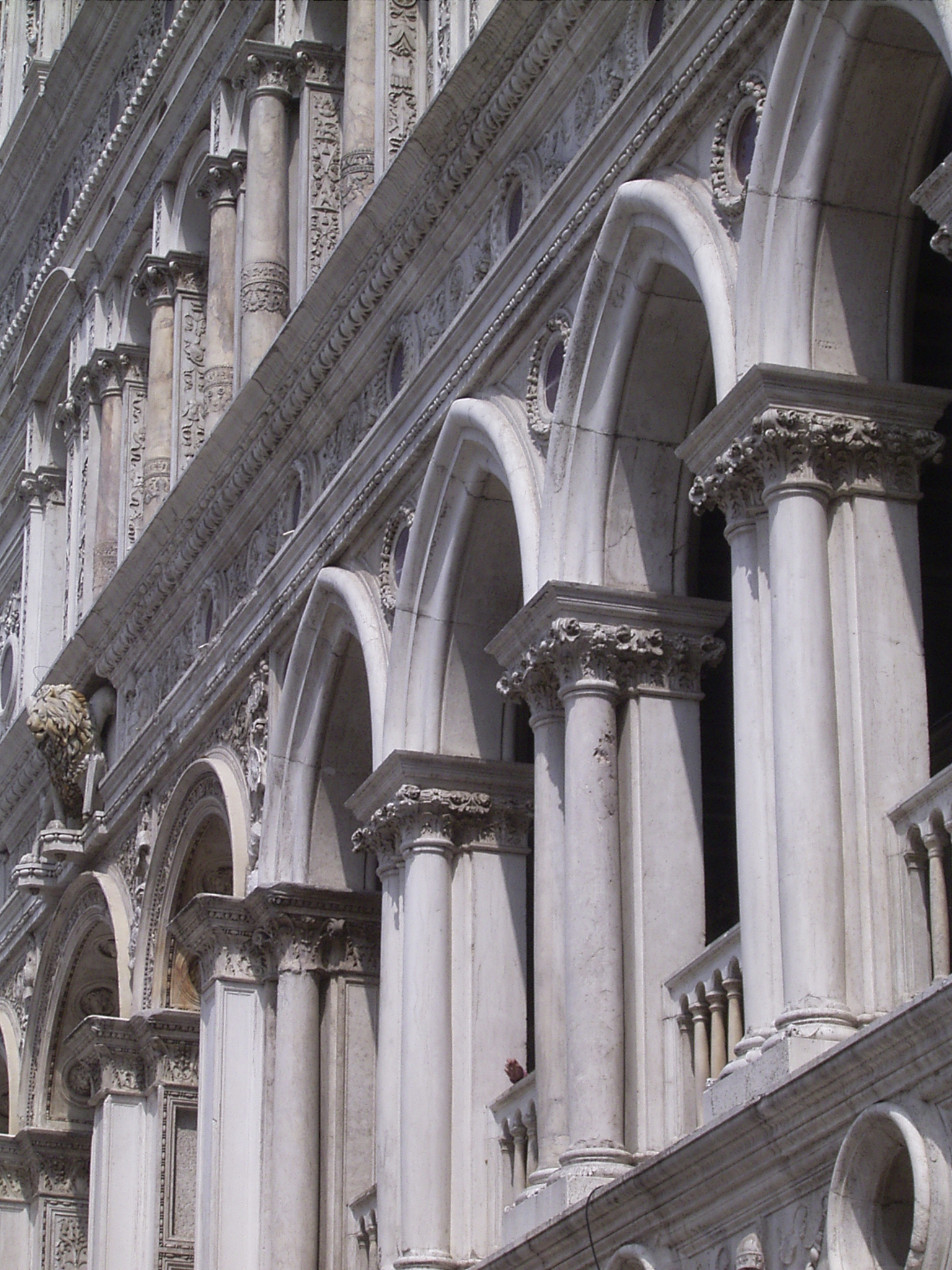 Il Palazzo Ducale a Venezia.